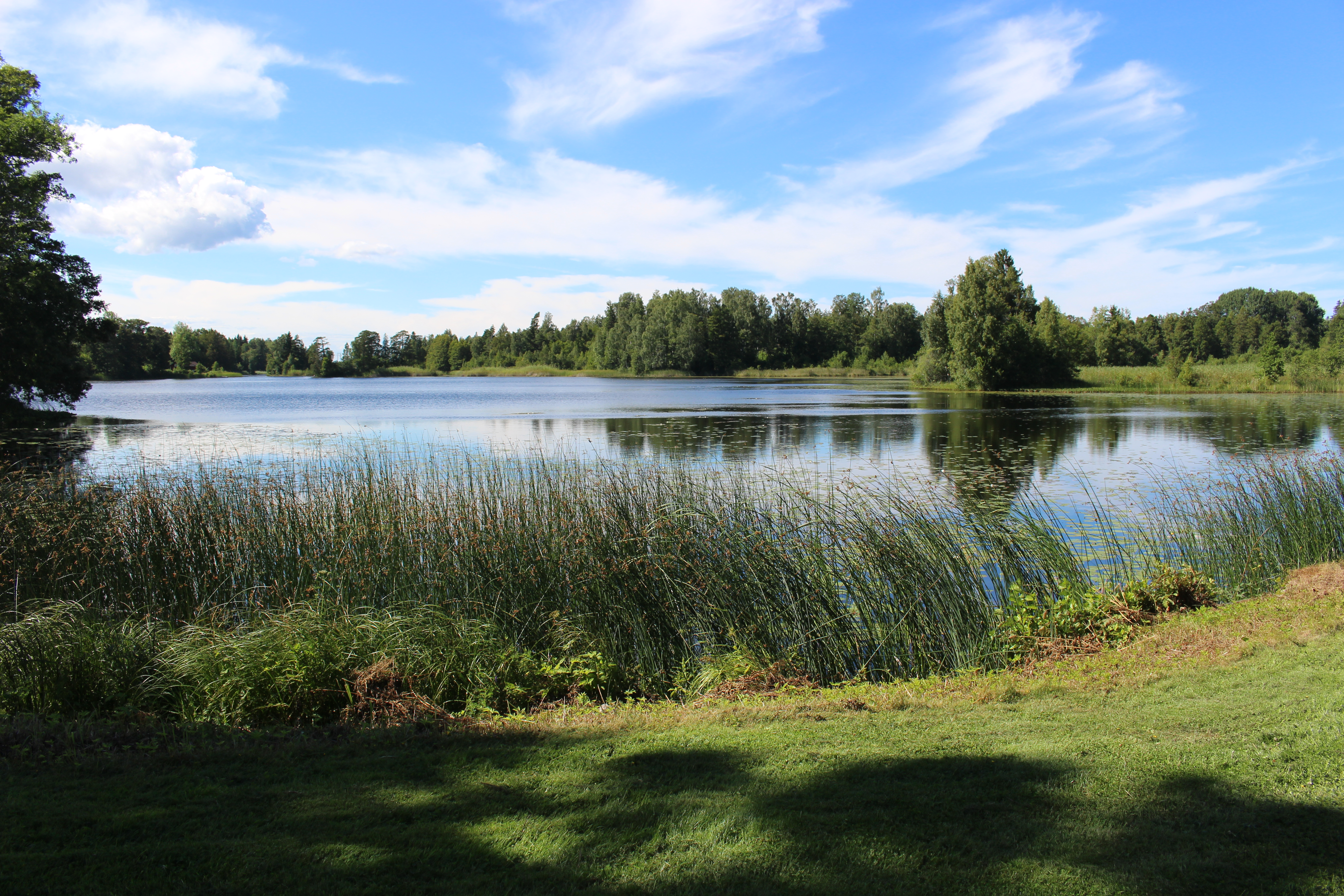 Bruksdammens sydöstra del vid Forsmarks bruk där den avvattnas av Forsmarksån.